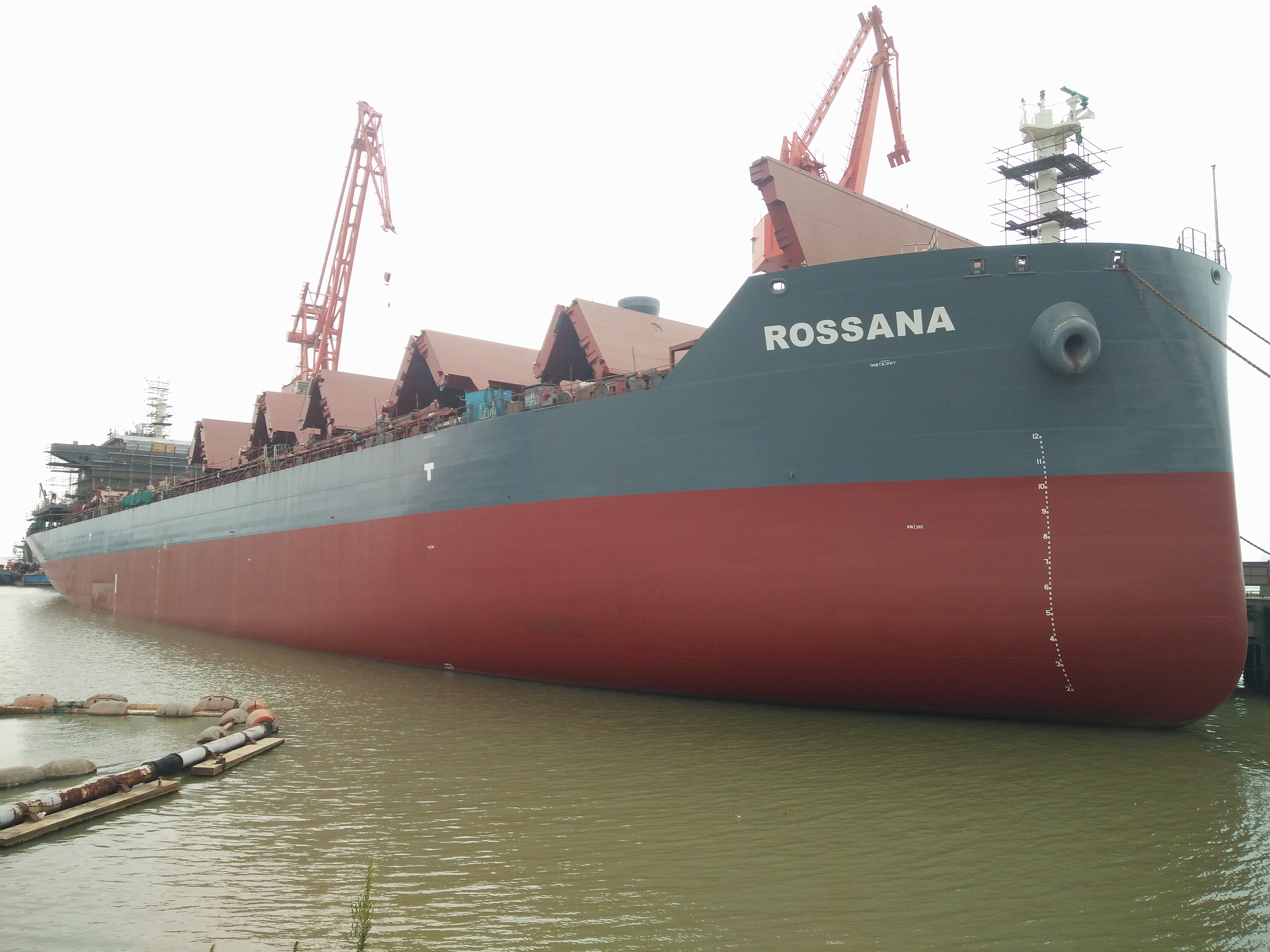 Rossana (ship, 2016) - IMO 9696838